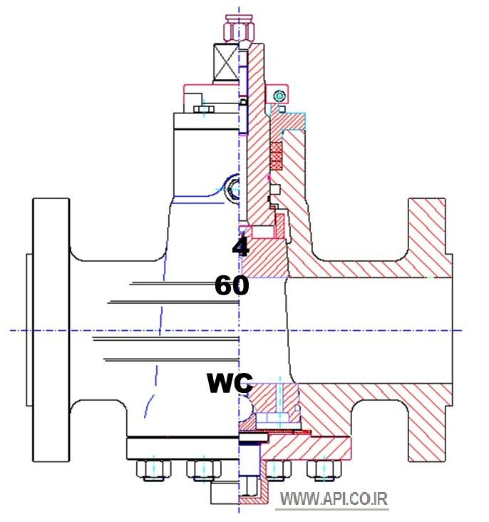 نقشه آموزشی شیر سماوری بالانس شونده با فشار